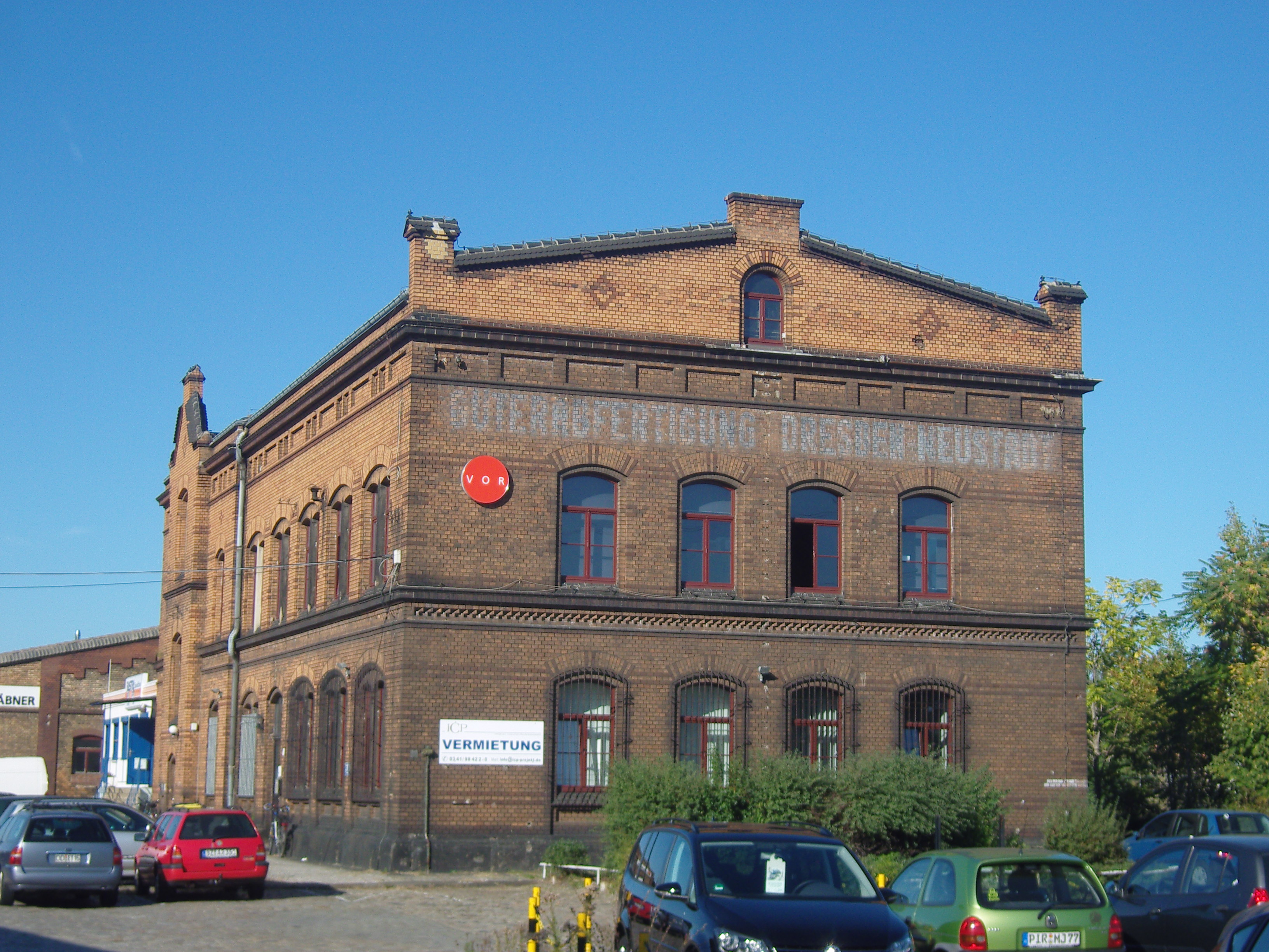 Denkmalgeschütztes Gebäude auf dem ehem. Leipziger Bahnhof in der Eisenbahnstraße 2 in Dresden